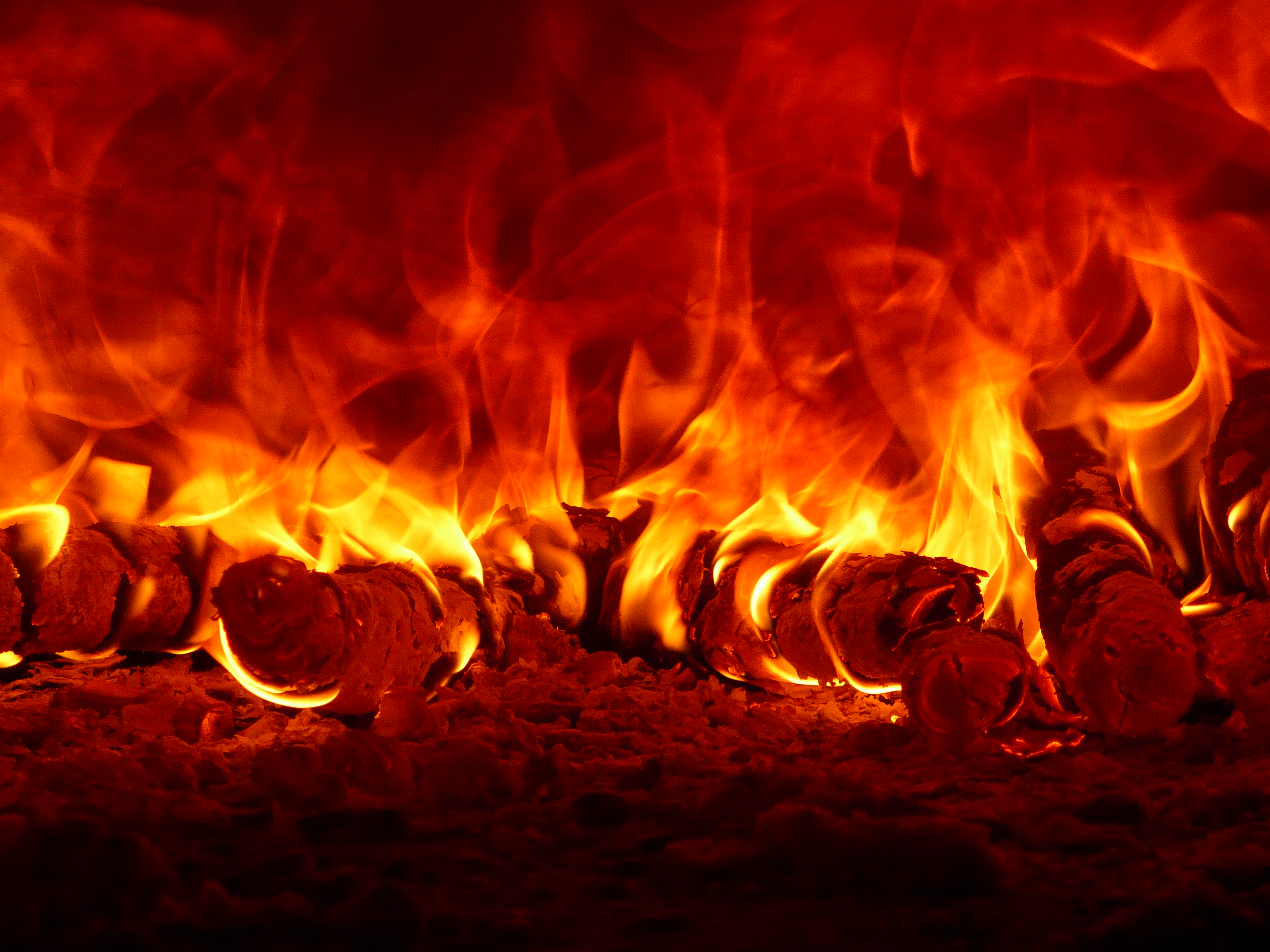 Odunların yandığı ateş